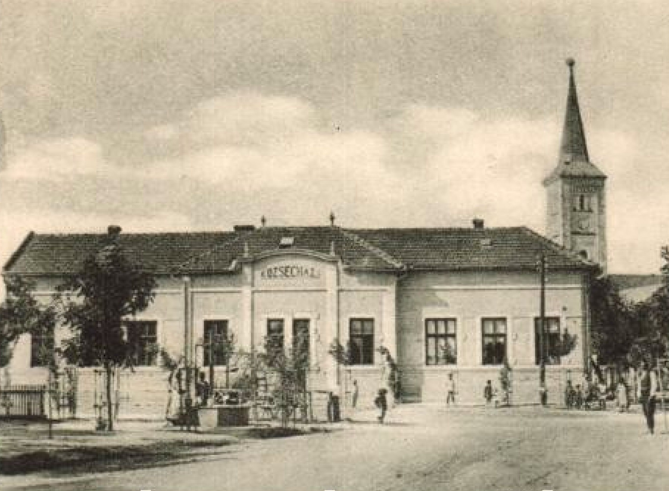 Régi képeslap - Furtai községháza a 20. század elején. Háttérben a református templom.